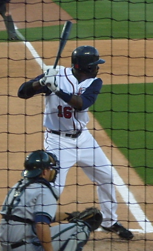 Reggie Abercrombie